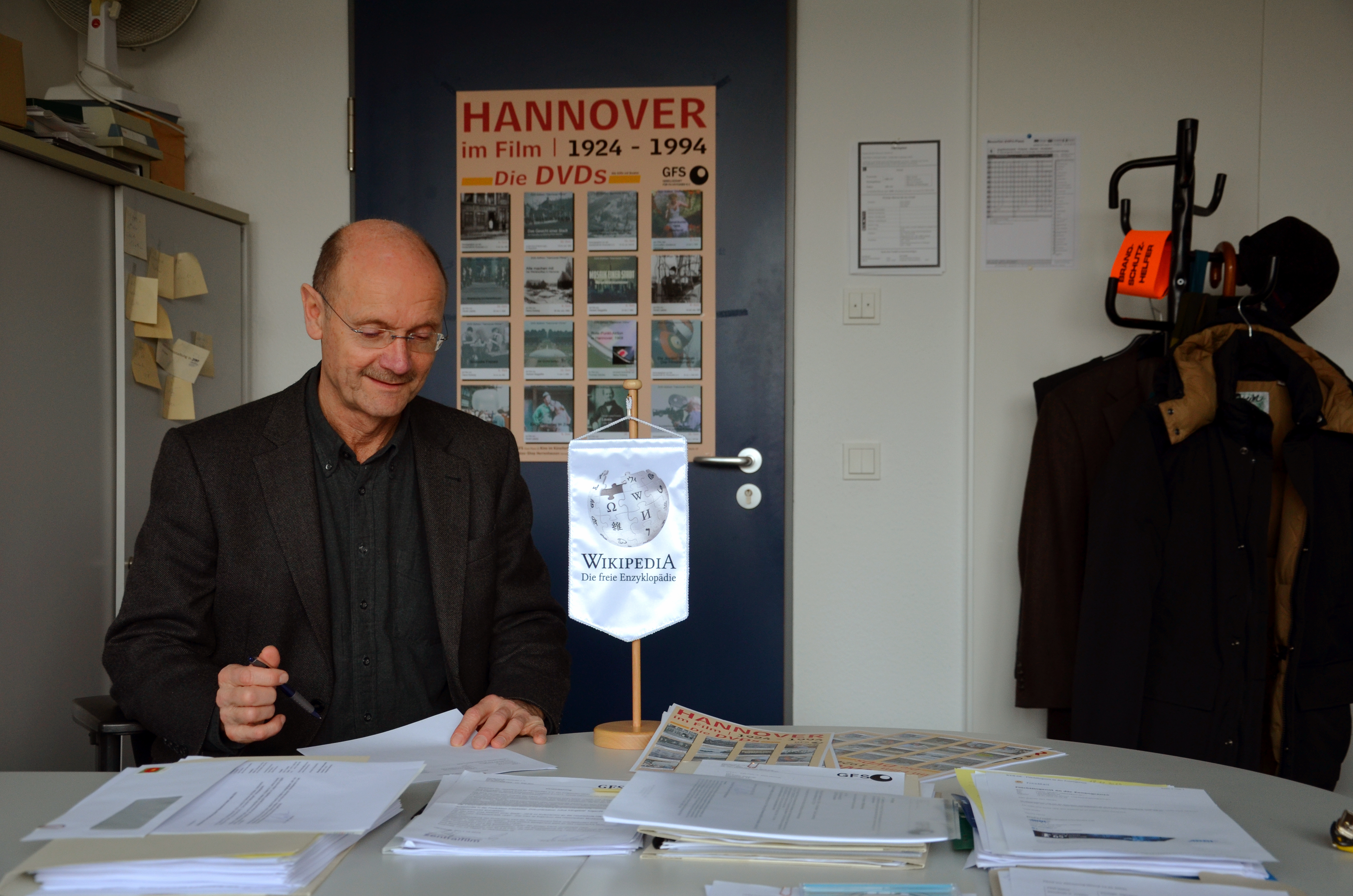 Dr. Peter Stettner, Mitarbeiter an der Hochschule Hannover (University of Applied Sciences and Arts), Fakultät Medien, Information und Design, Leiter des dortigen Kulturarchivs sowie Leiter der Gesellschaft für Filmstudien, hier am 21. Januar 2015 in seinem Büro Expo Plaza 12, Raum 307 ...